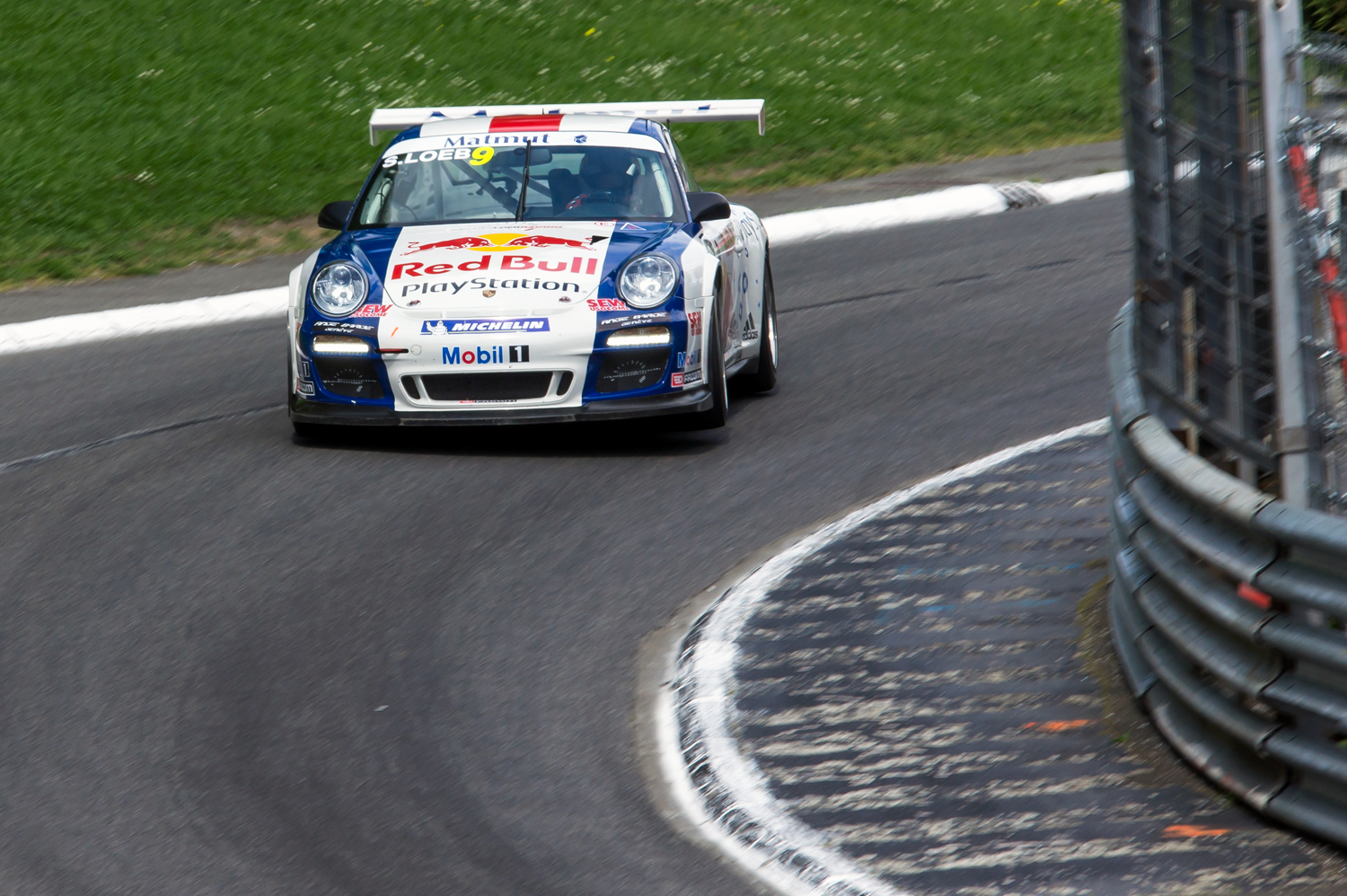 Grand Prix de Pau 2012 Dimanche 13 Mai 2012 Porsche 911 GT3 Cup #9 Sébastien Loeb Racing Sébastien Loeb.